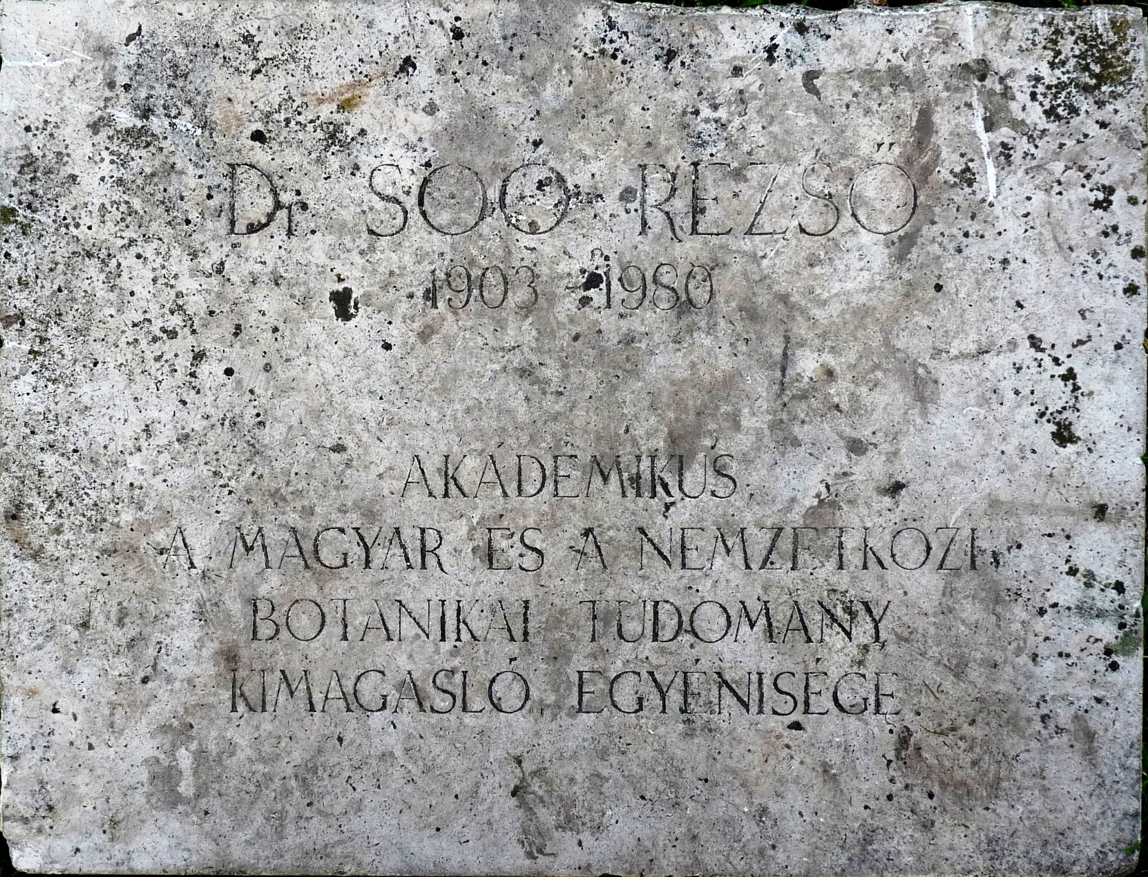 Dr. Soó Rezső (1903-1980) kétszeres Kossuth-díjas magyar botanikus, egyetemi tanár emléktáblája. (Budapest, XIII. ker. Margit-sziget, Rózsakert).